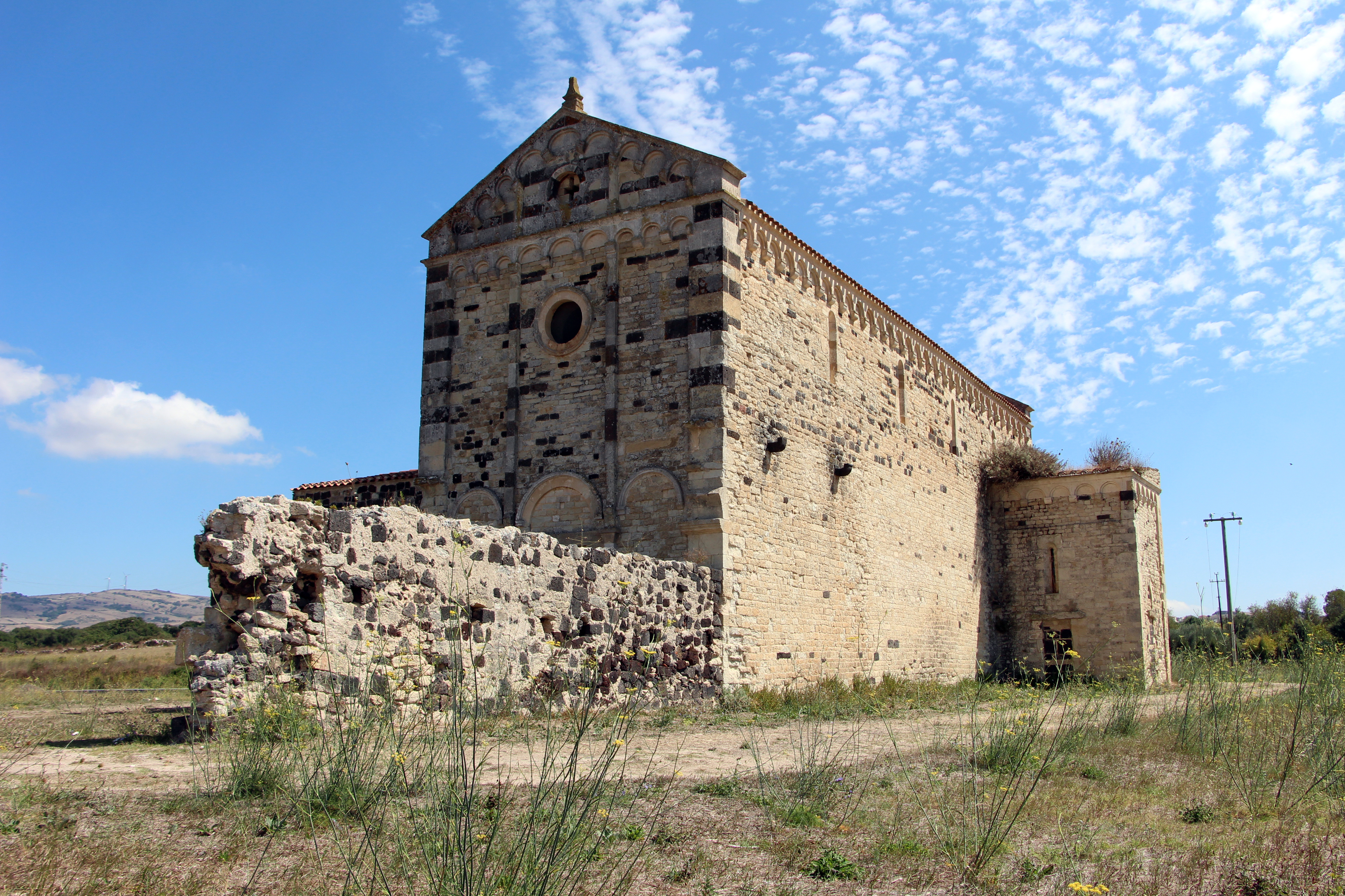 Ploaghe, SS